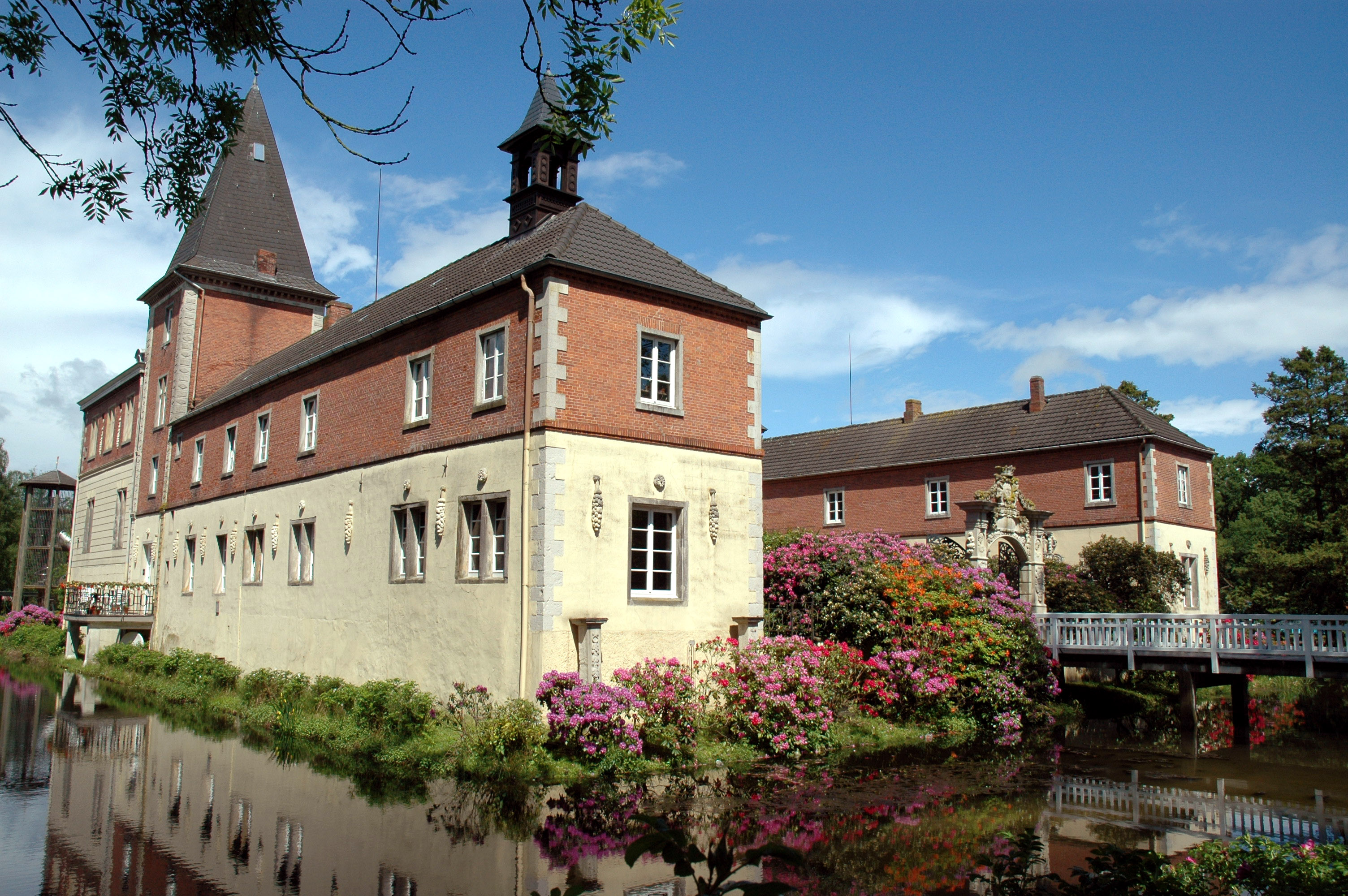 Schloss Dankern, Ansicht von der Seite